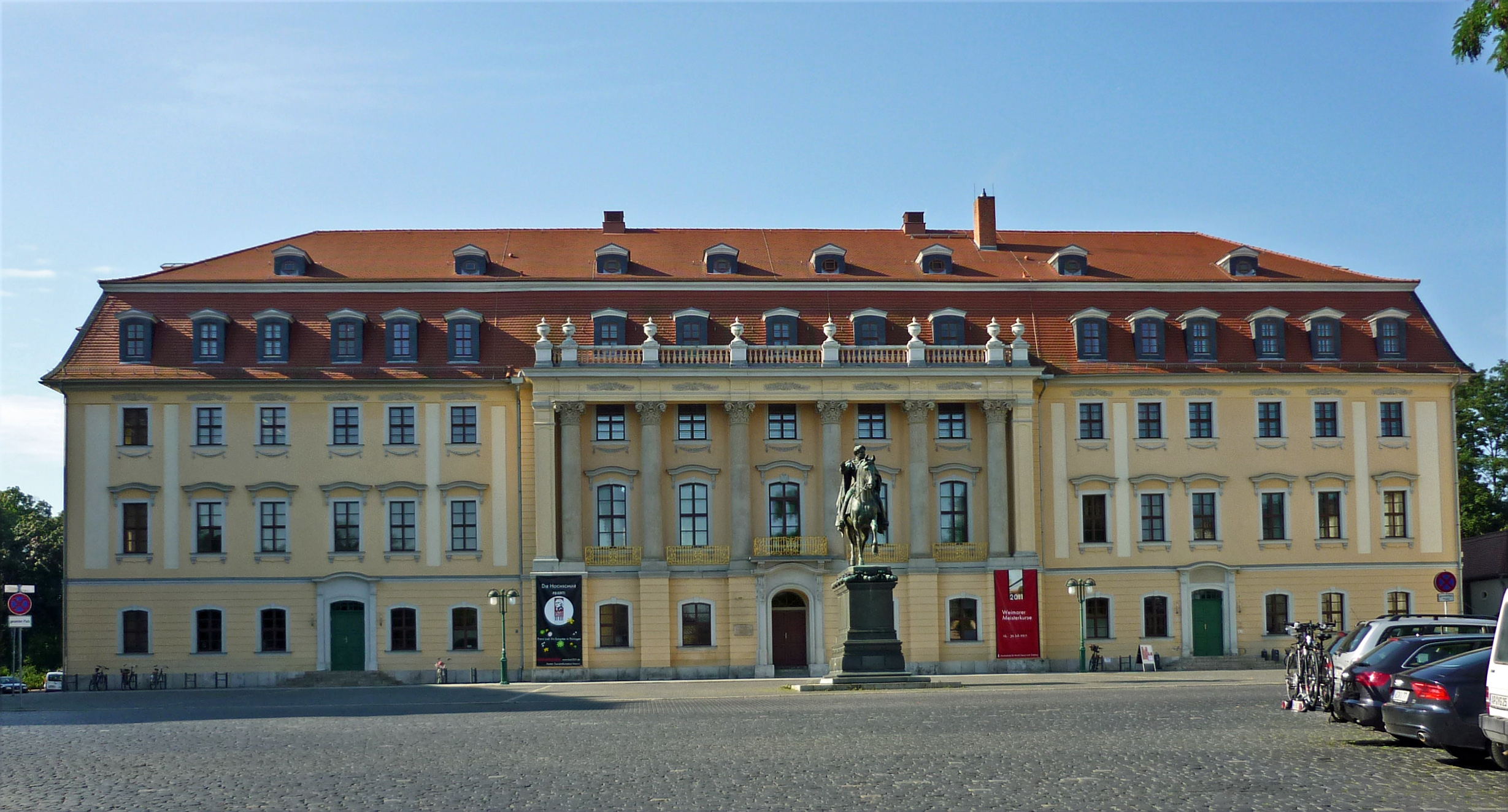 Fürstenhaus Weimar am Platz der Demokratie